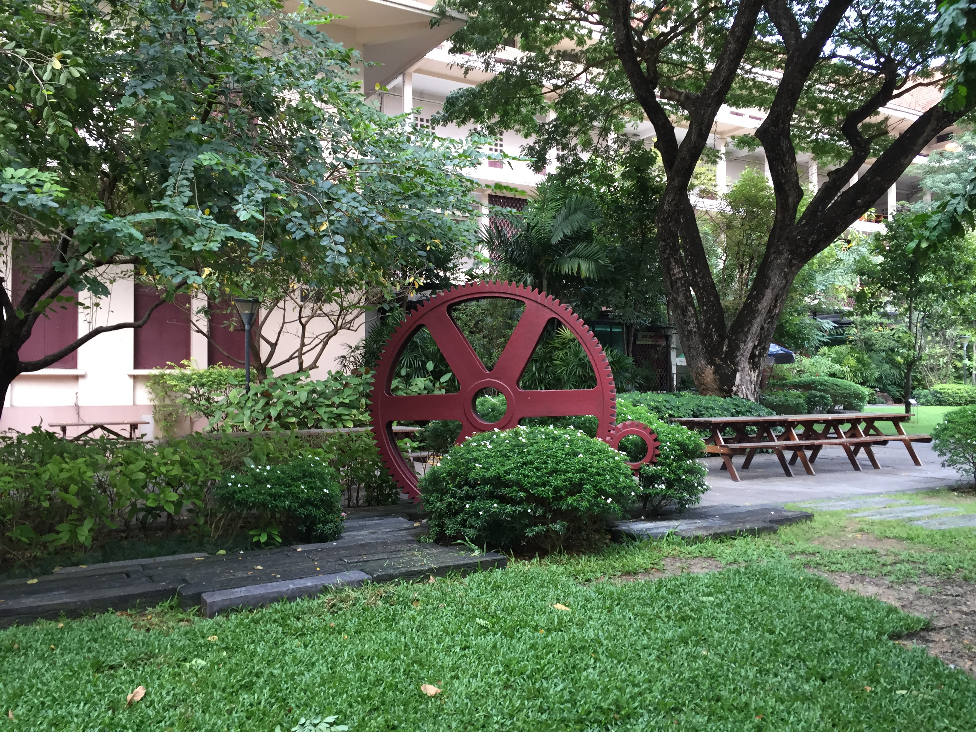 สวนในคณะวิศวกรรมศาสตร์ จุฬาลงกรณ์มหาวิทยาลัย